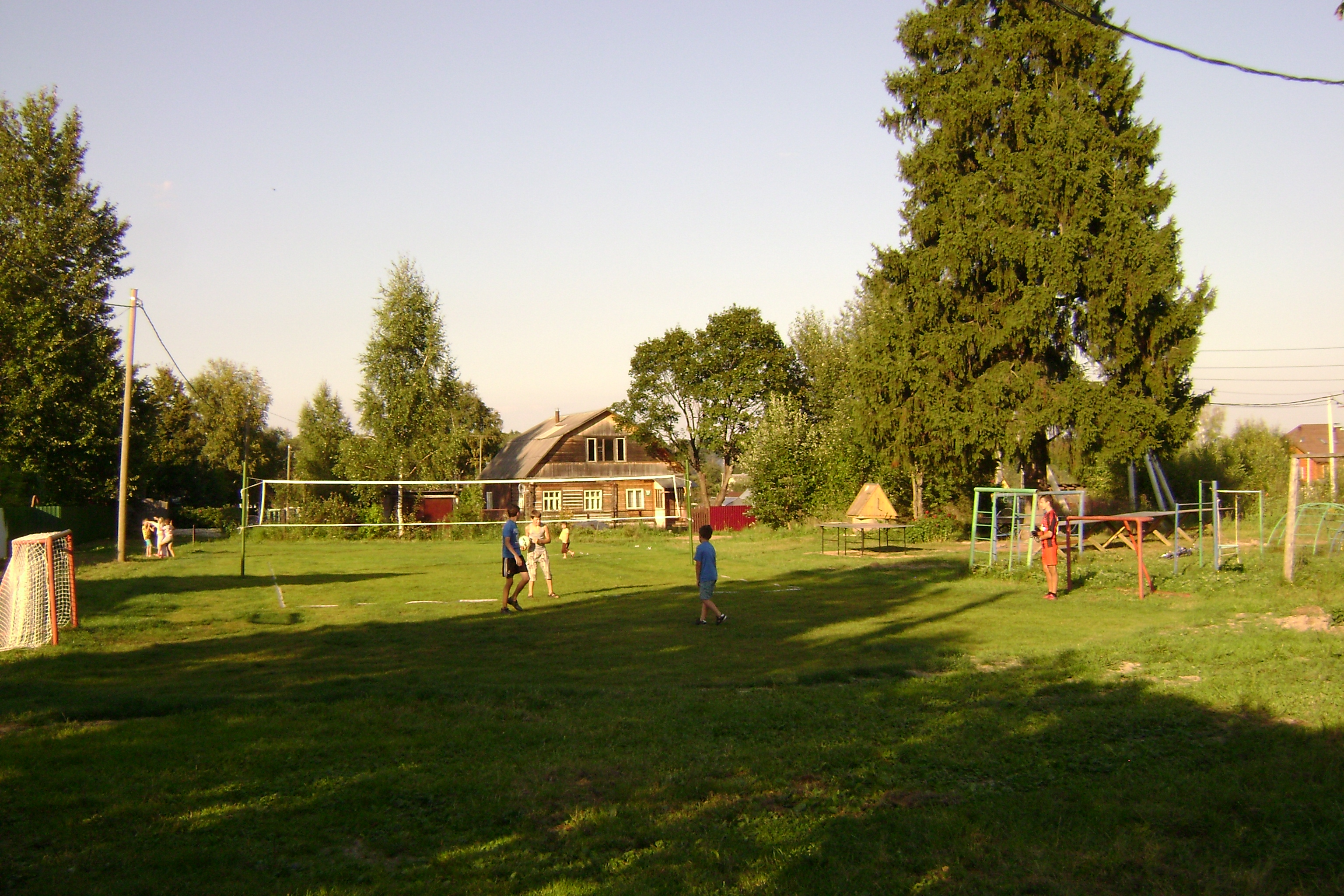 Детская площадка